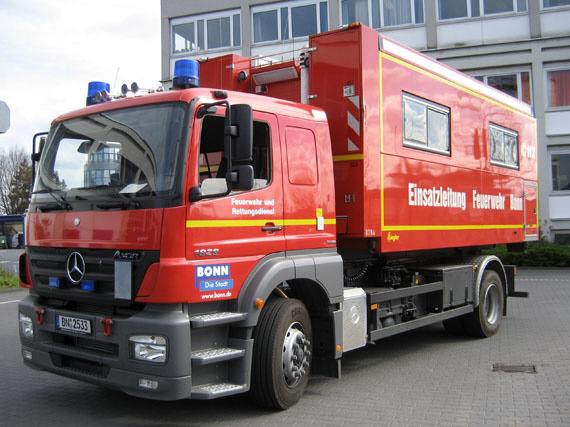 Wechselladerfahrzeug mit Abrollbehälter Einsatzleitung